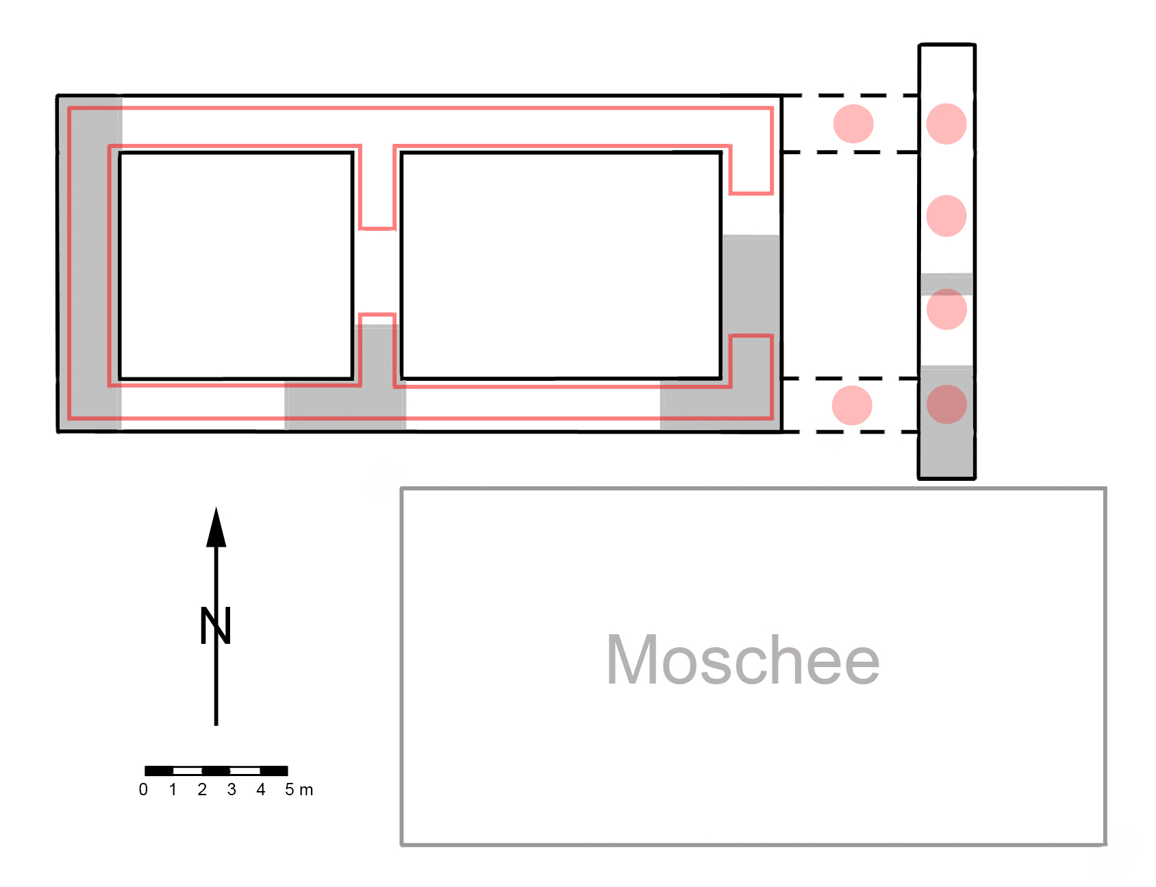 Rekonstruierter Grundriss des Artemistempels (grau = erhaltene Fundamente; hellrot = möglicher Tempelgrundriss mit Orientierung nach Osten)